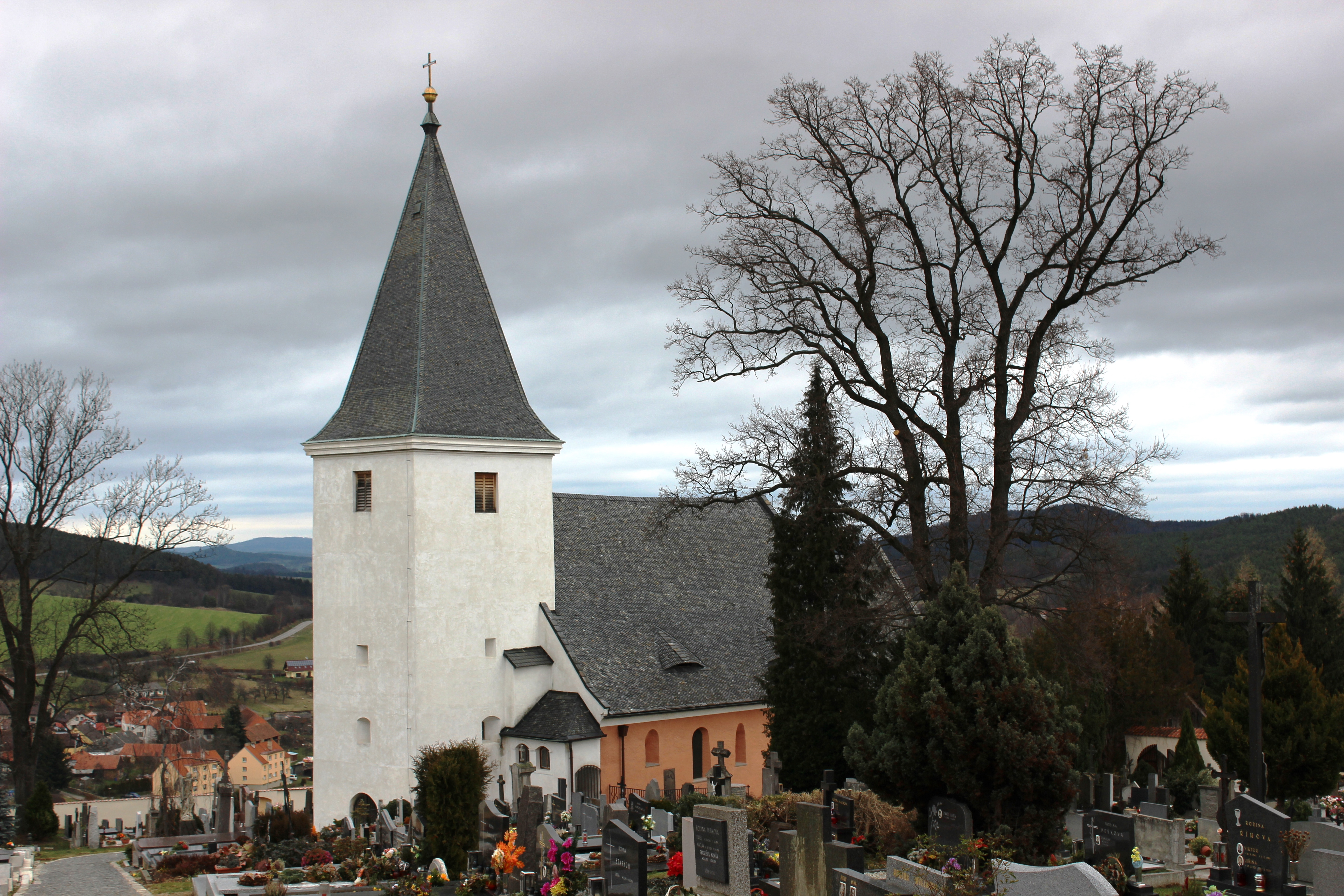 Prachatice, Kostel svatých Petra a Pavla. Česká republika.